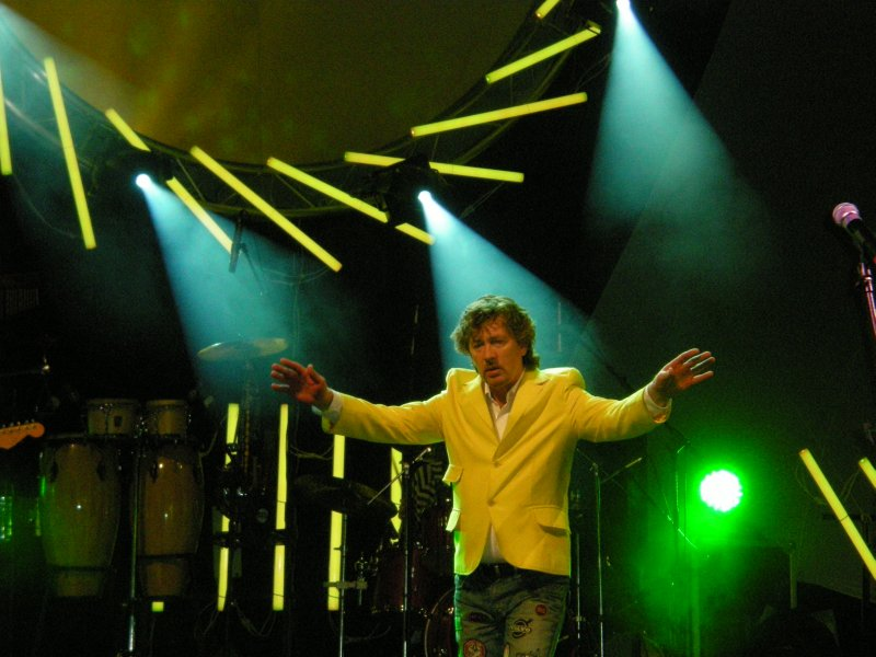 Andris Freidenfelds, lead singer of Labvēlīgais tips